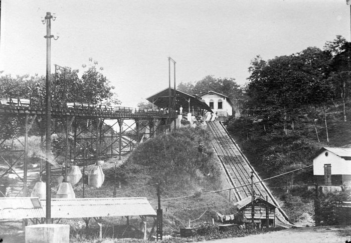 Repronegatief. Kabelbaan en remhelling te Pandjang